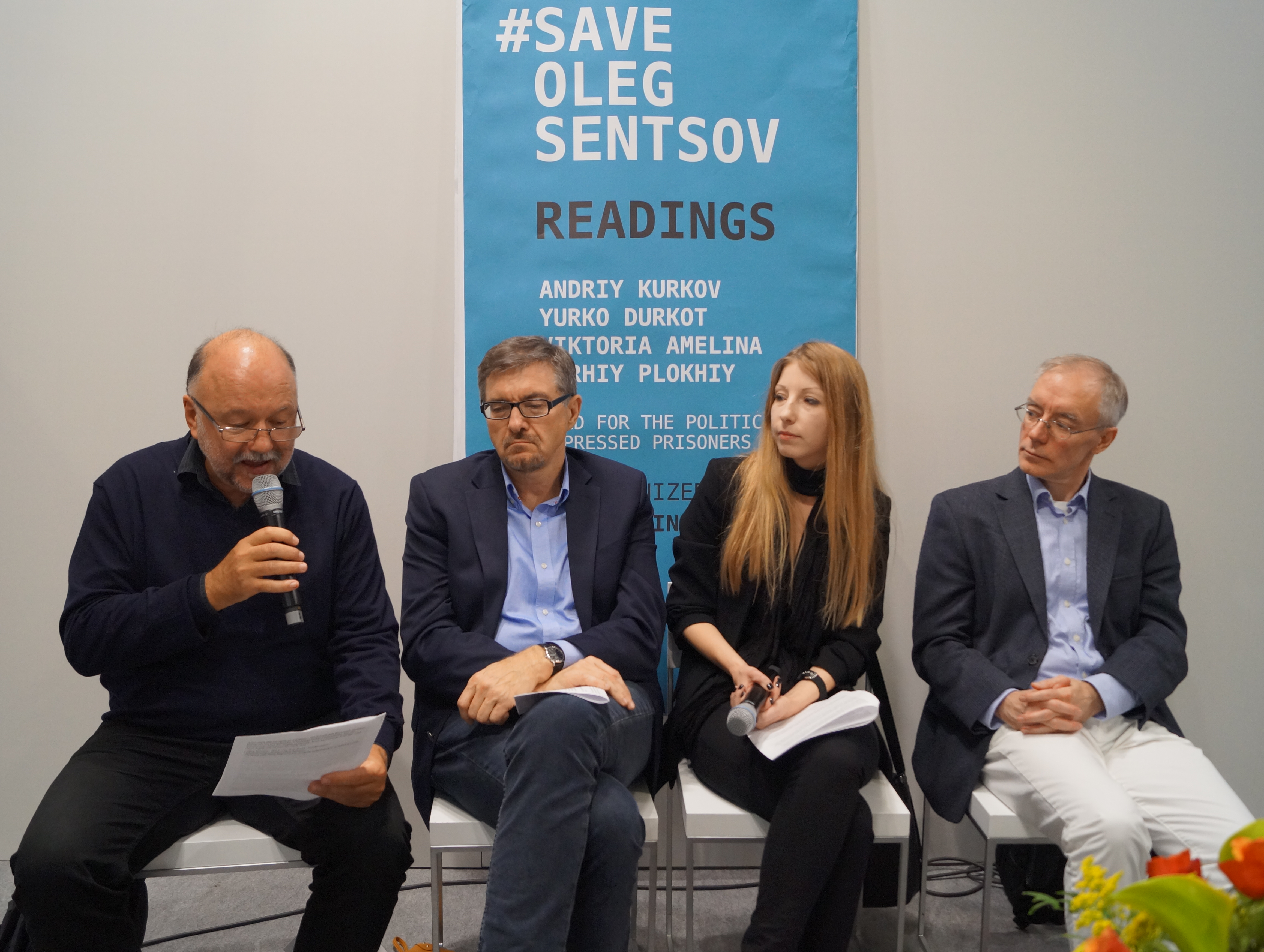 Frankfurter Buchmesse 2018